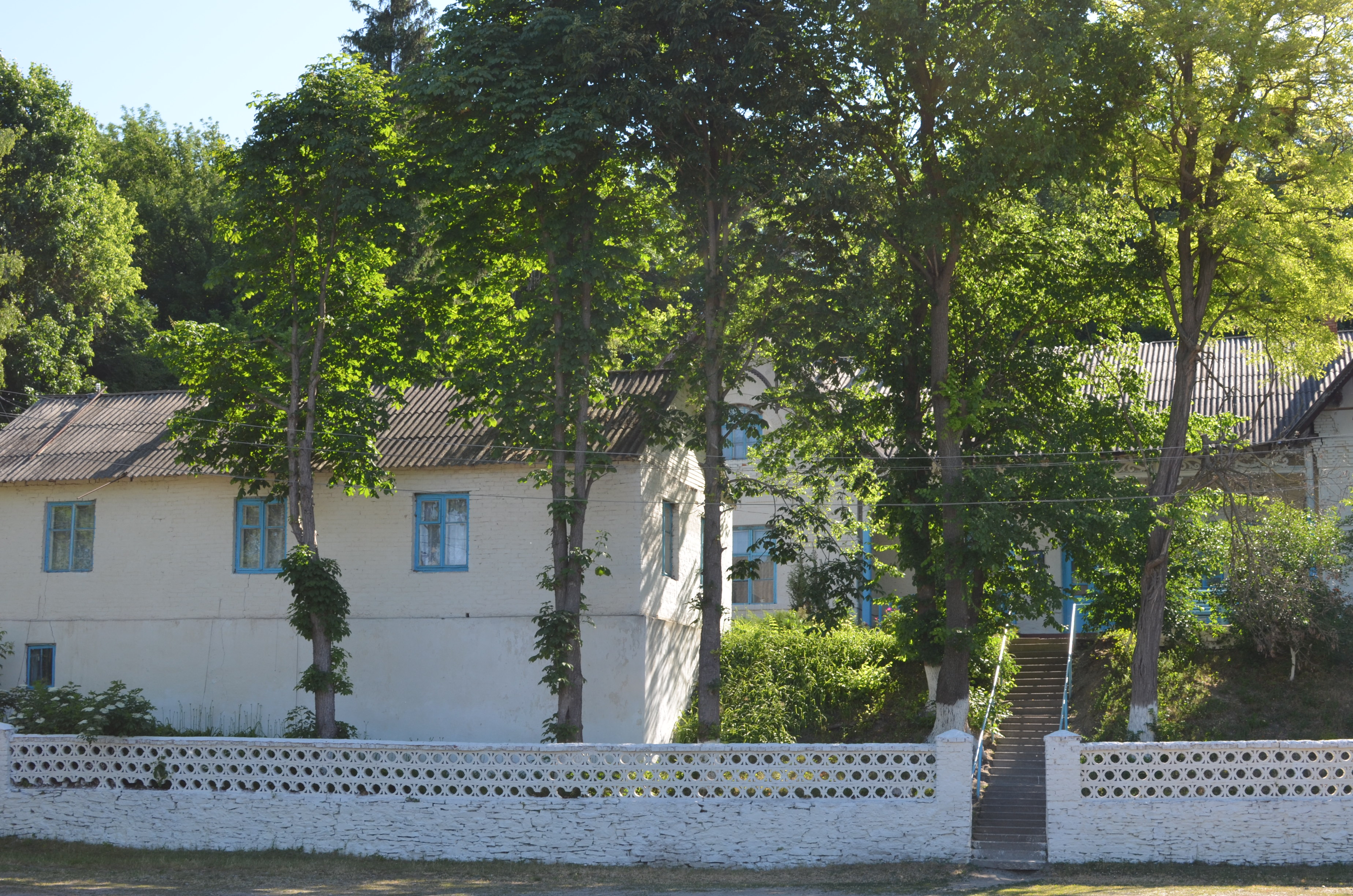 Лікарня у Вендичанах